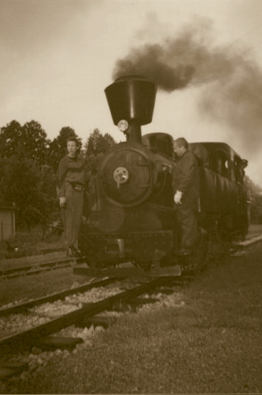 Posun lokomotívou ČKD č. 5 po stanici v Čiernom Balogu.